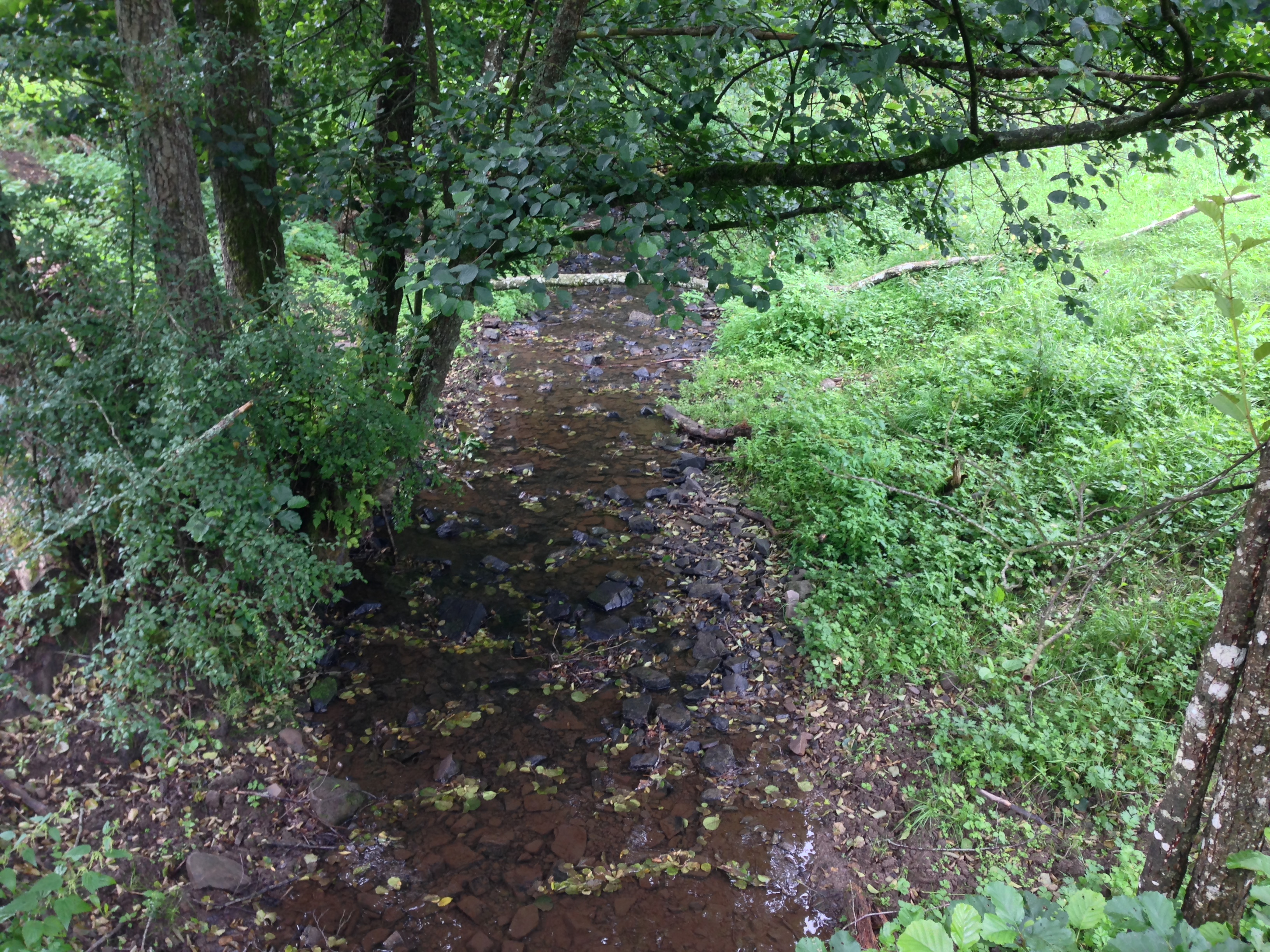 Dreisbach südlich von Wershofen